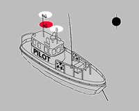 Navigation light /Luces de navegación